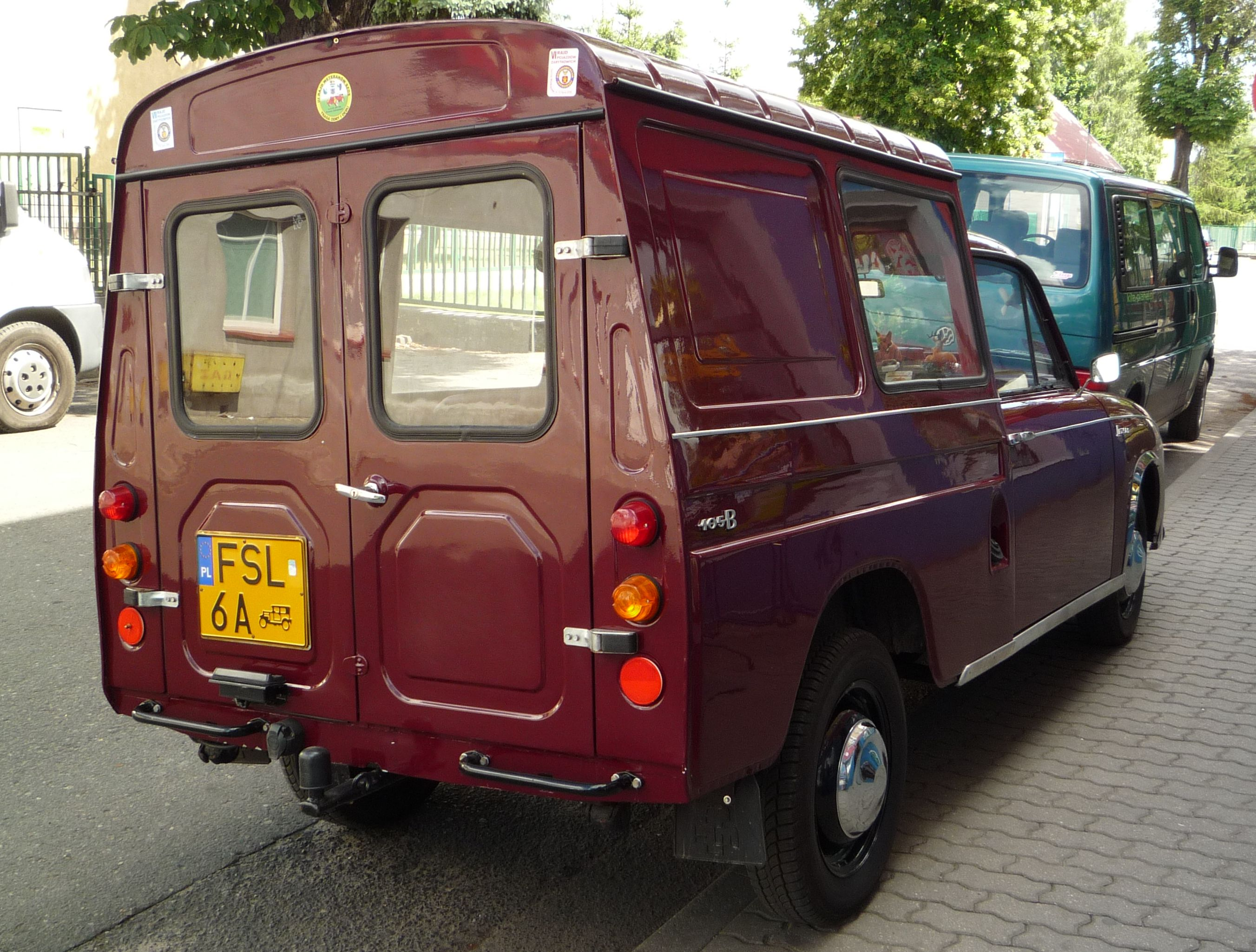 FSM Syrena Bosto w Słubicach.